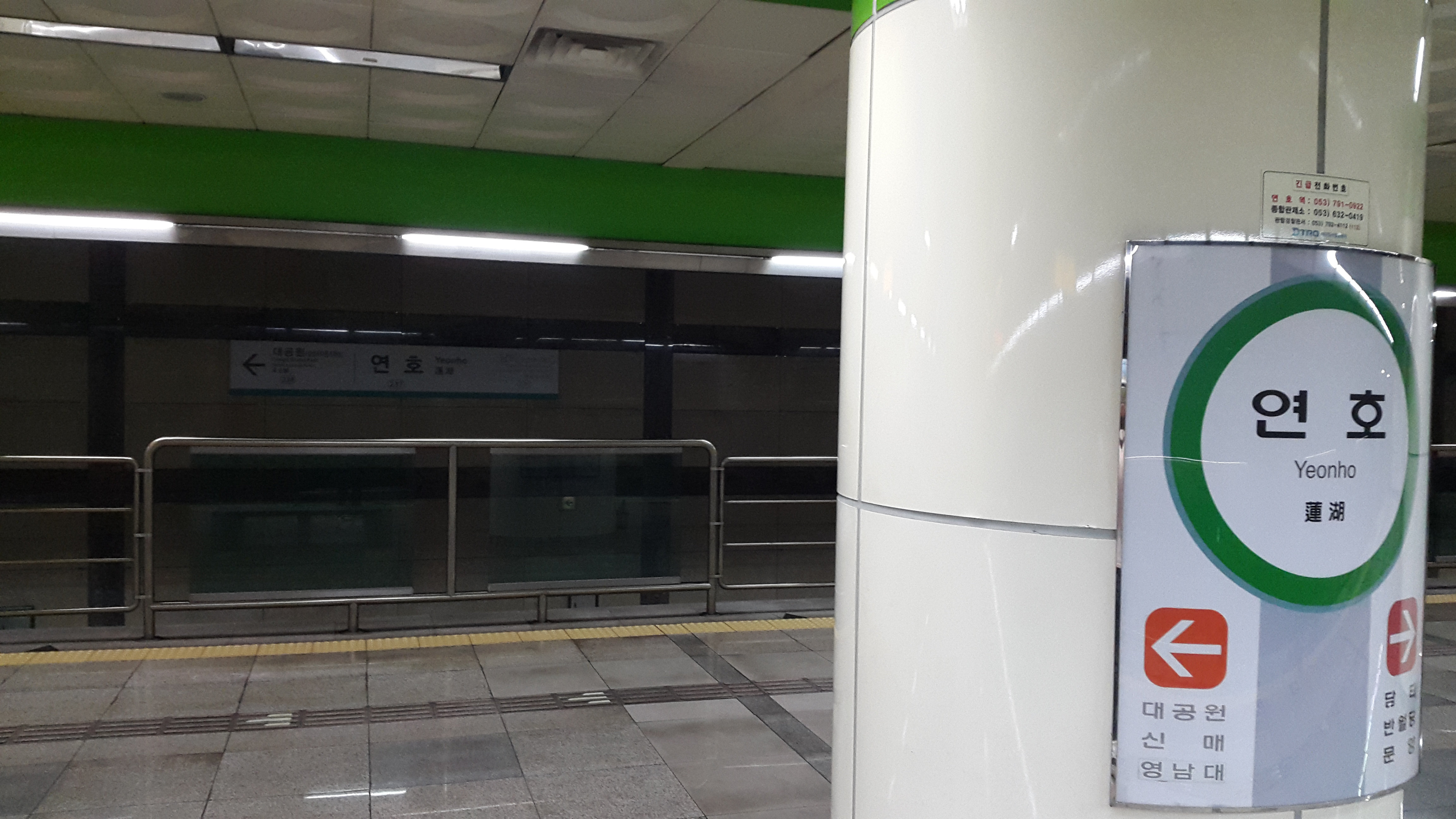 연호역 기둥역명판, 벽역명판